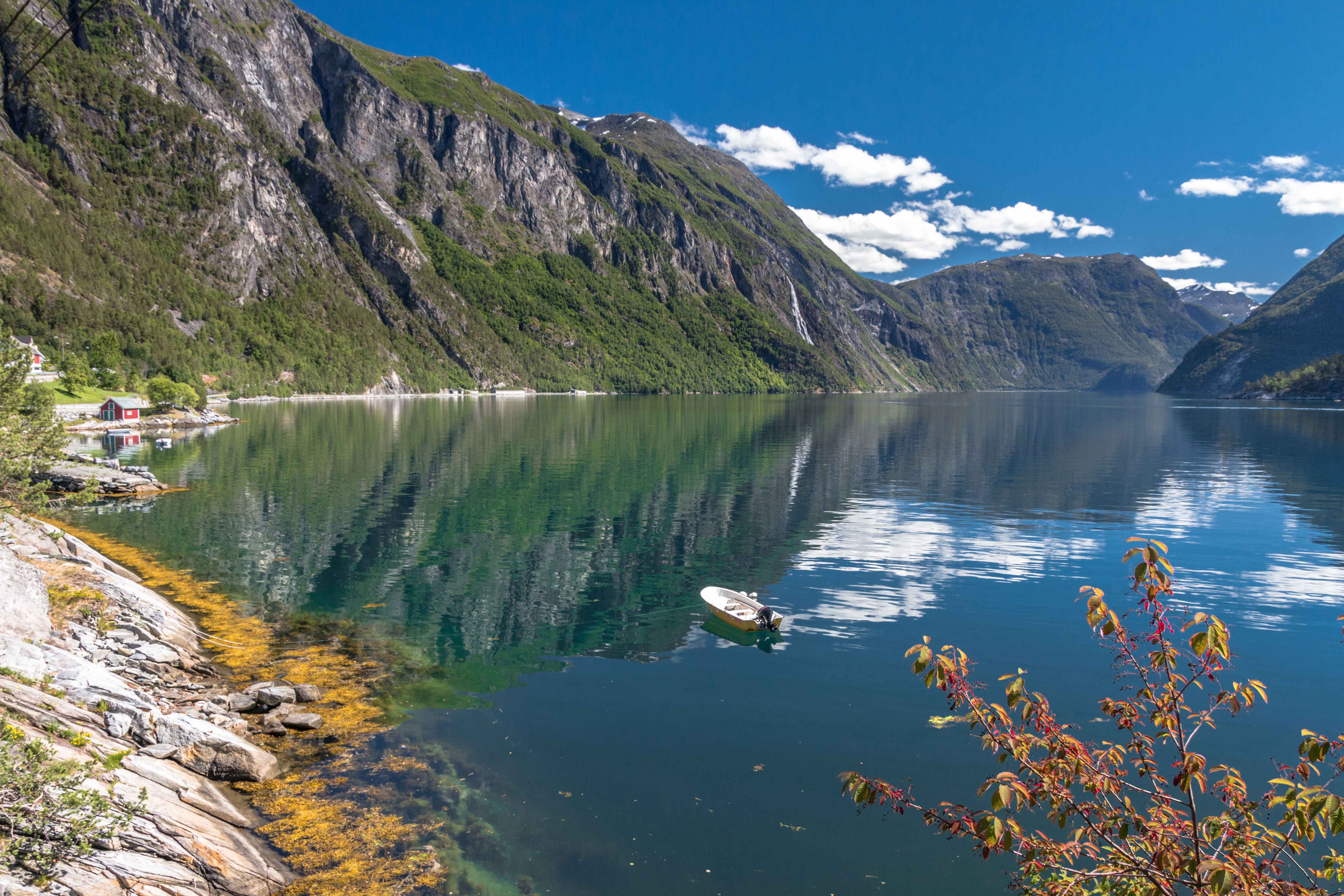 Tafjord